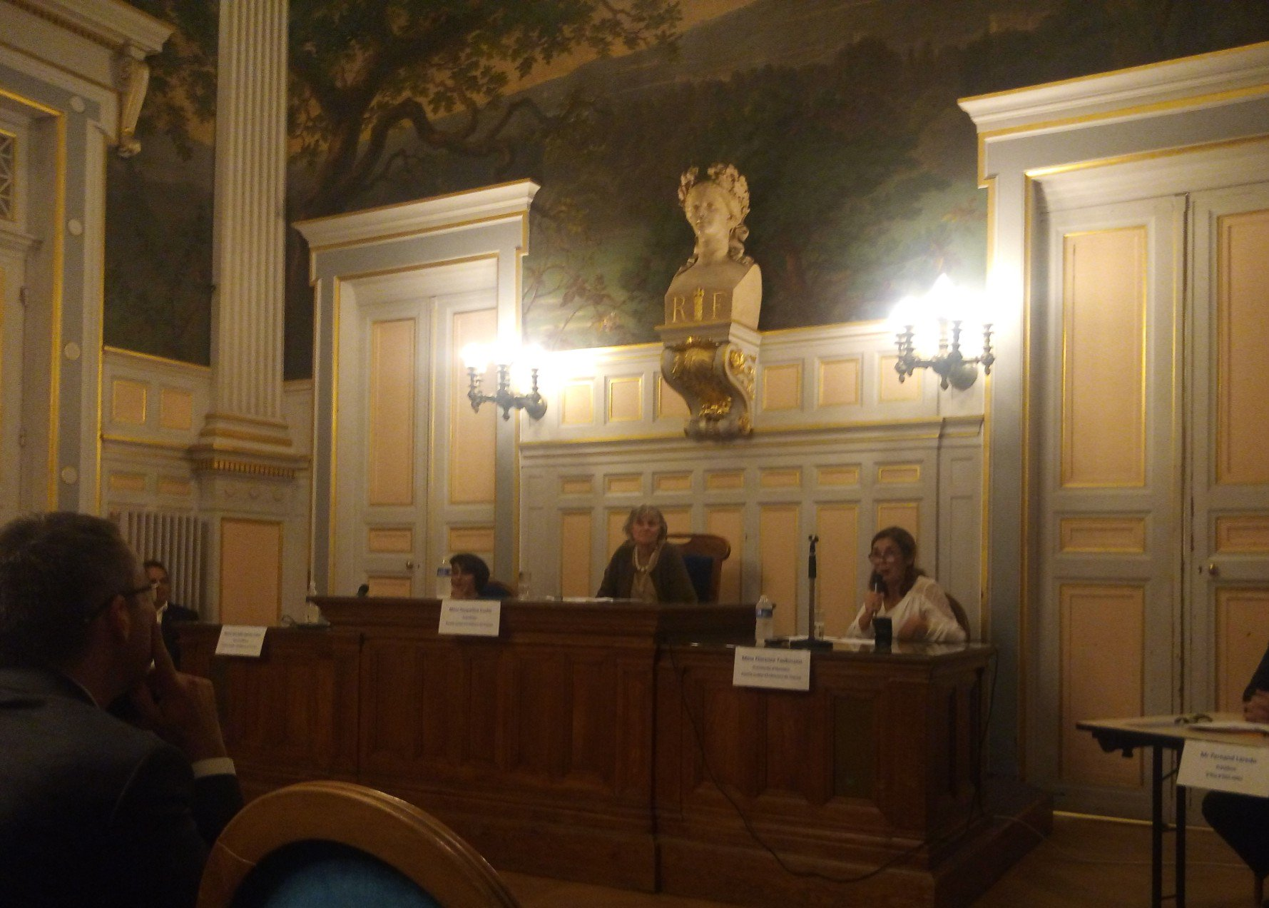 Conférence 10 octobre 2018 à la mairie du 16e arrondissement de Paris. "Juifs et chrétiens : l'AJCF, une fraternité - rempart contre l'antisémitisme". De gauche à droite : Mireille HADAS-LEBEL, vice-présidente de l’AJCF, Jacqueline CUCHE, présidente de l’AJCF, Florence TAUBMANN, présidente d’honneur de l’AJCF